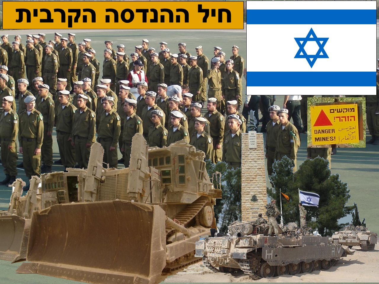 Israel Defense Forces Combat Engineering Corps חיל ההנדסה הקרבית של צה"ל